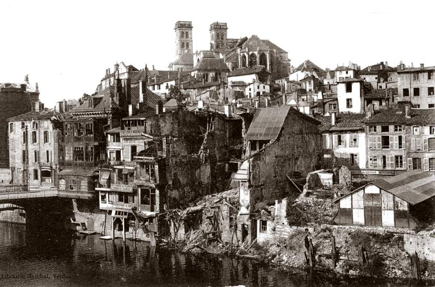 Verdun werd in 1916 volledig met de grond gelijk gemaakt.